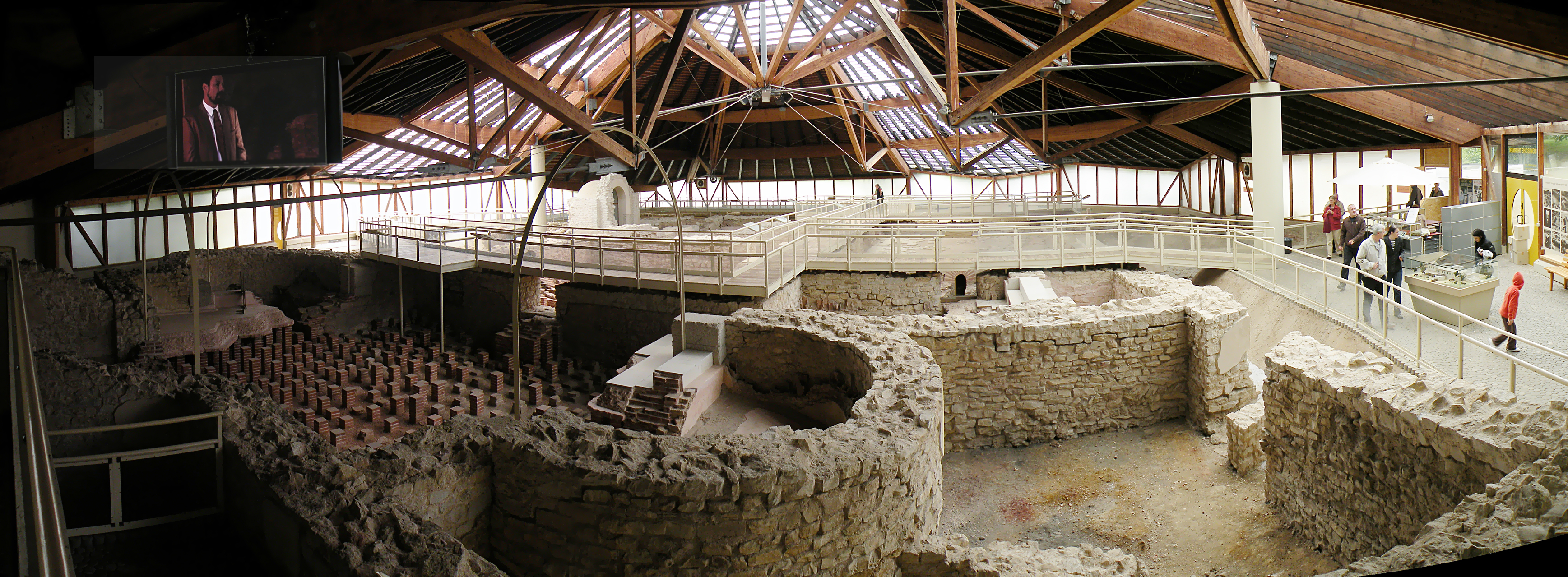 Roemerthermen.